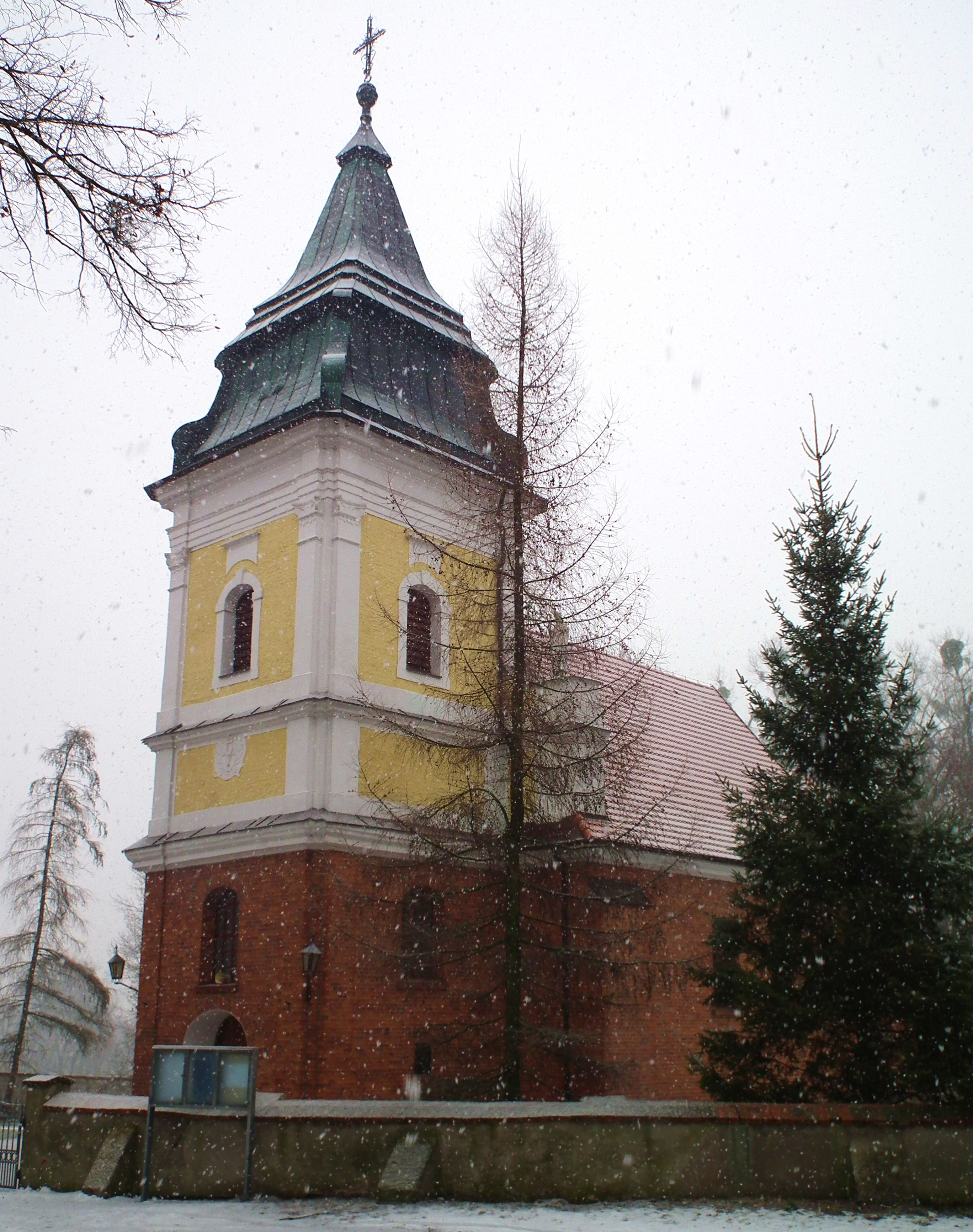 Kościół w Bieganowie.